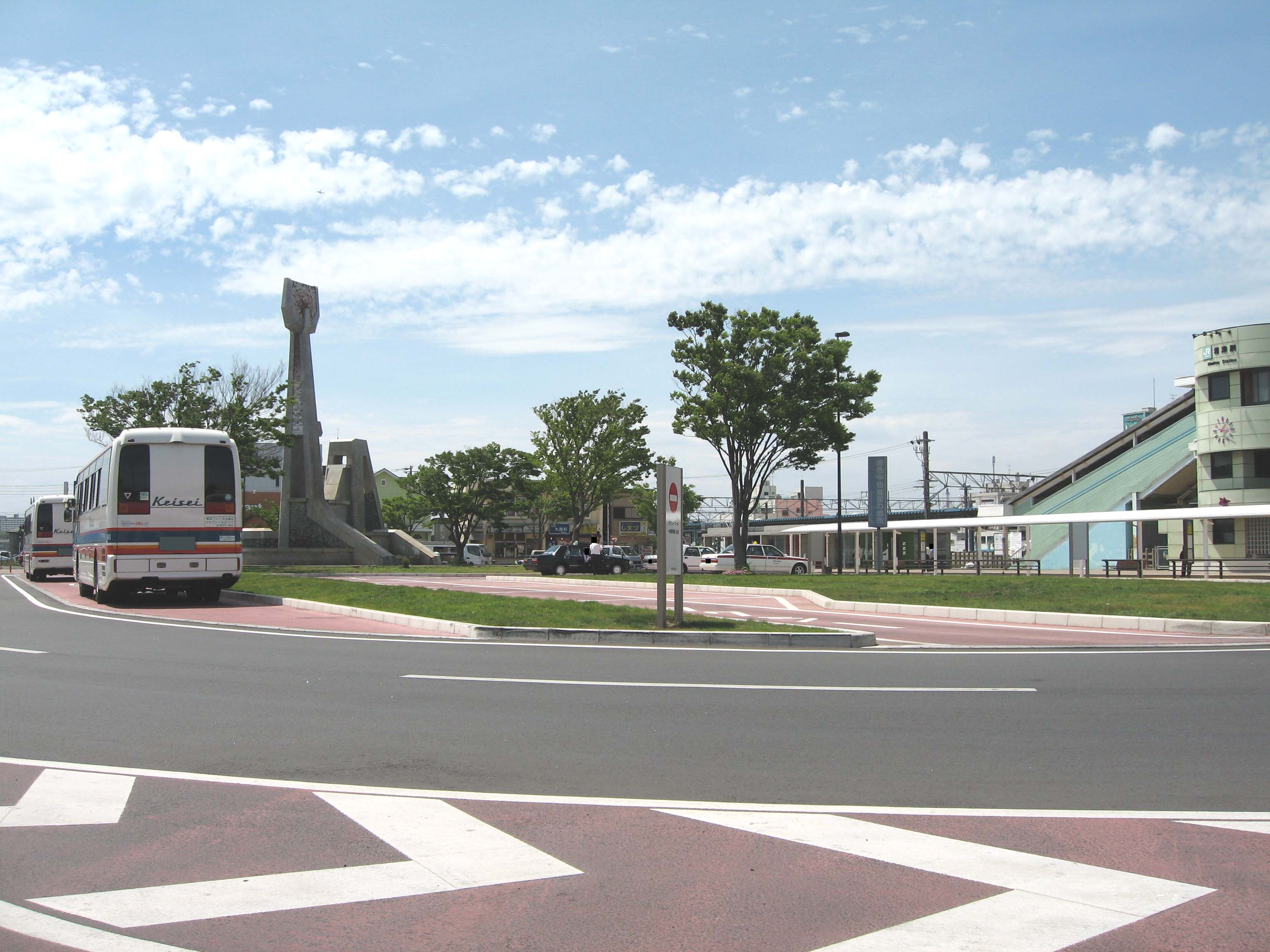 Kimitsu station, Uchibo Line, Chiba, Japan, 君津駅南口ロータリー